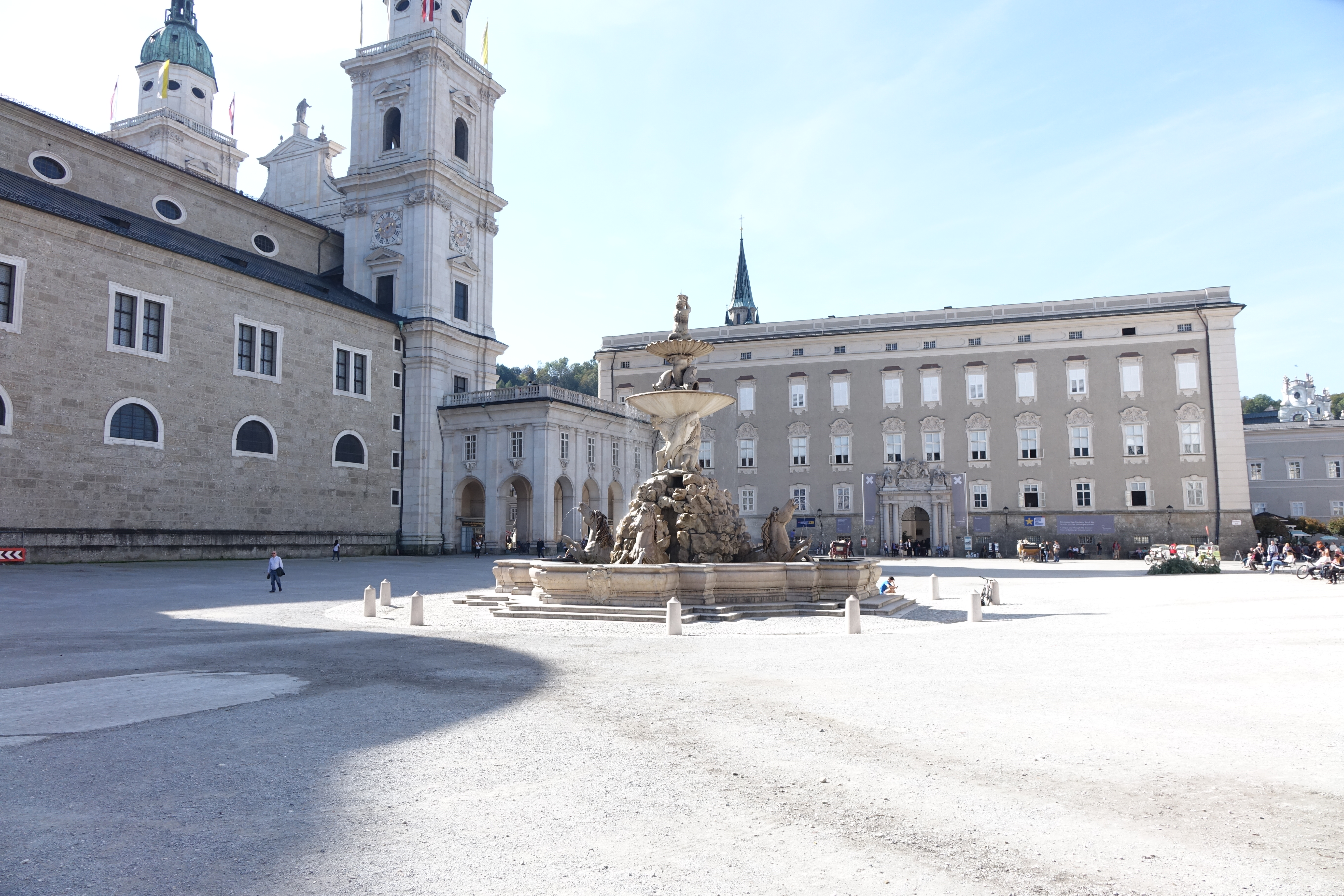 140930Salzburg, Austria